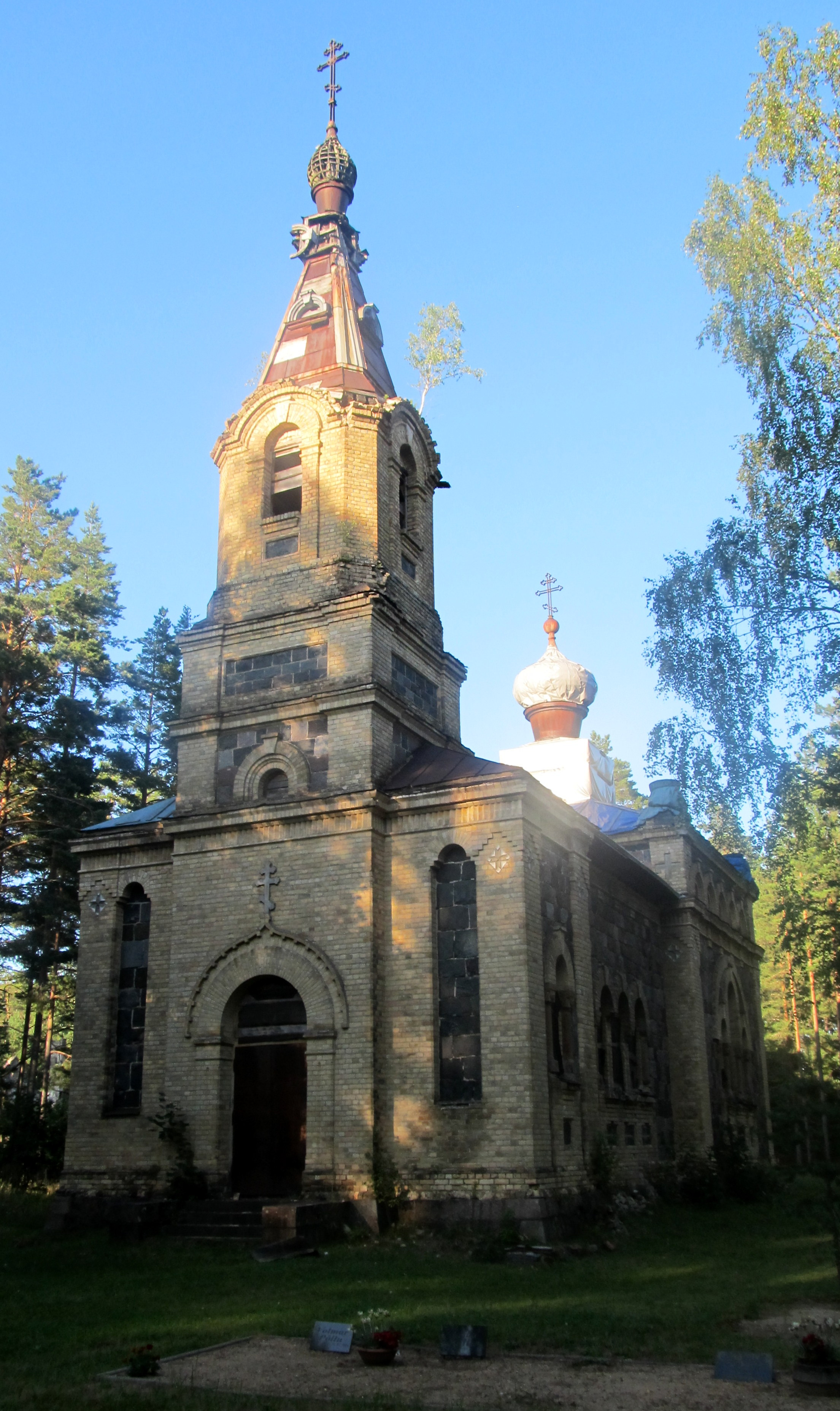 Puski õigeusu kirik